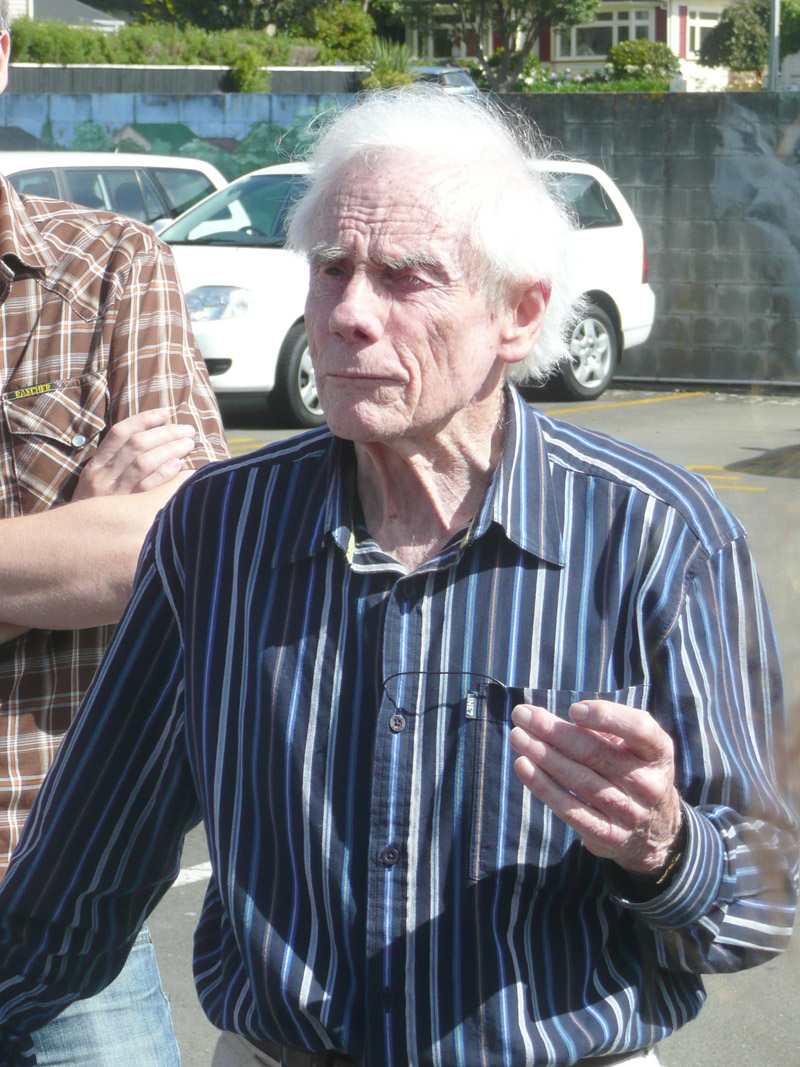 Bill-toomath